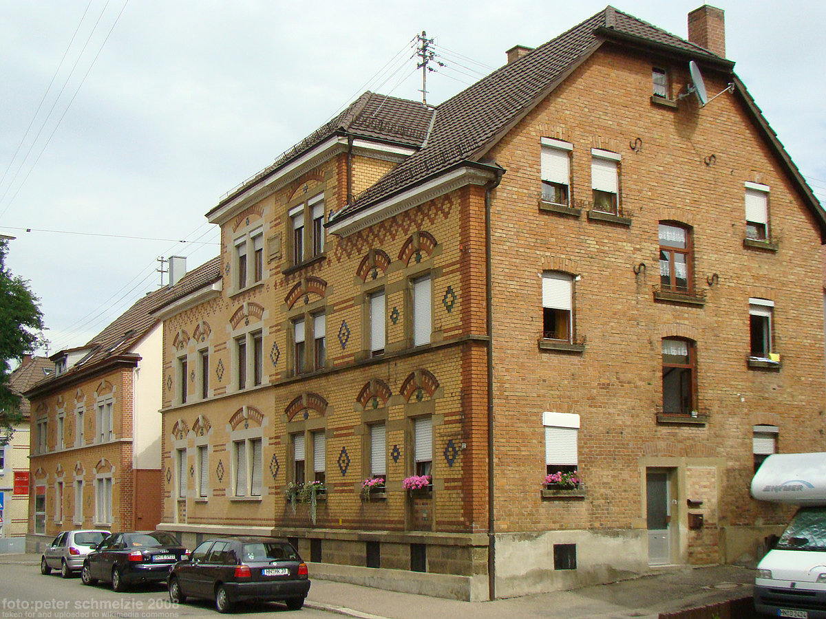 Denkmalgeschützte Gebäude Klingenberger Straße 153/155 in Heilbronn-Böckingen